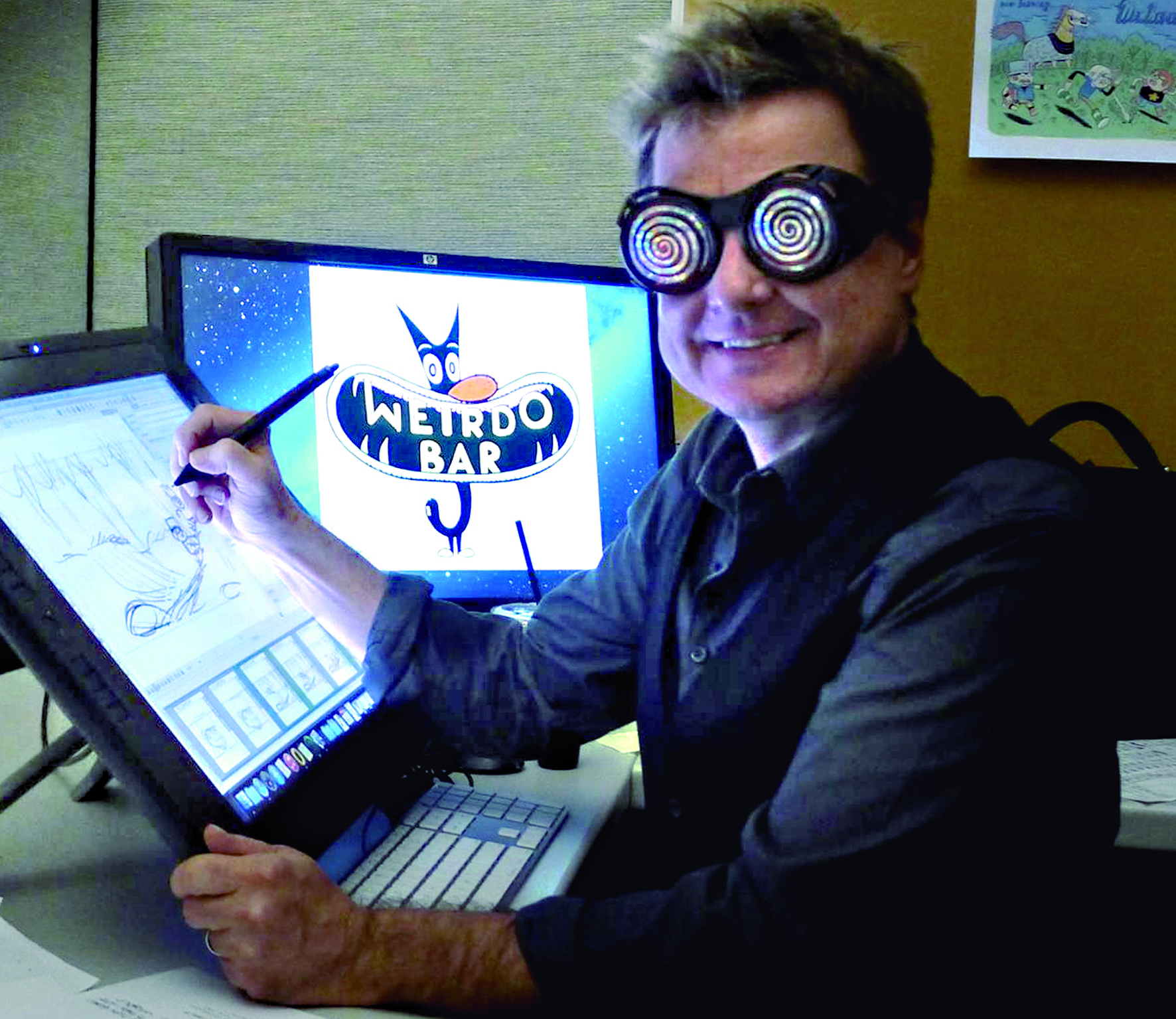 Foto del dibujante Kaz en su estudio. Kaz es conocido, sobre todo, por ser el dibujante de las tiras de humor Submundo (UnderWorld) editadas en castellano por la editorial Autsaider Cómics.